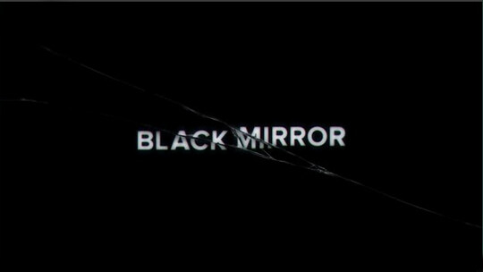 Black Mirror logo